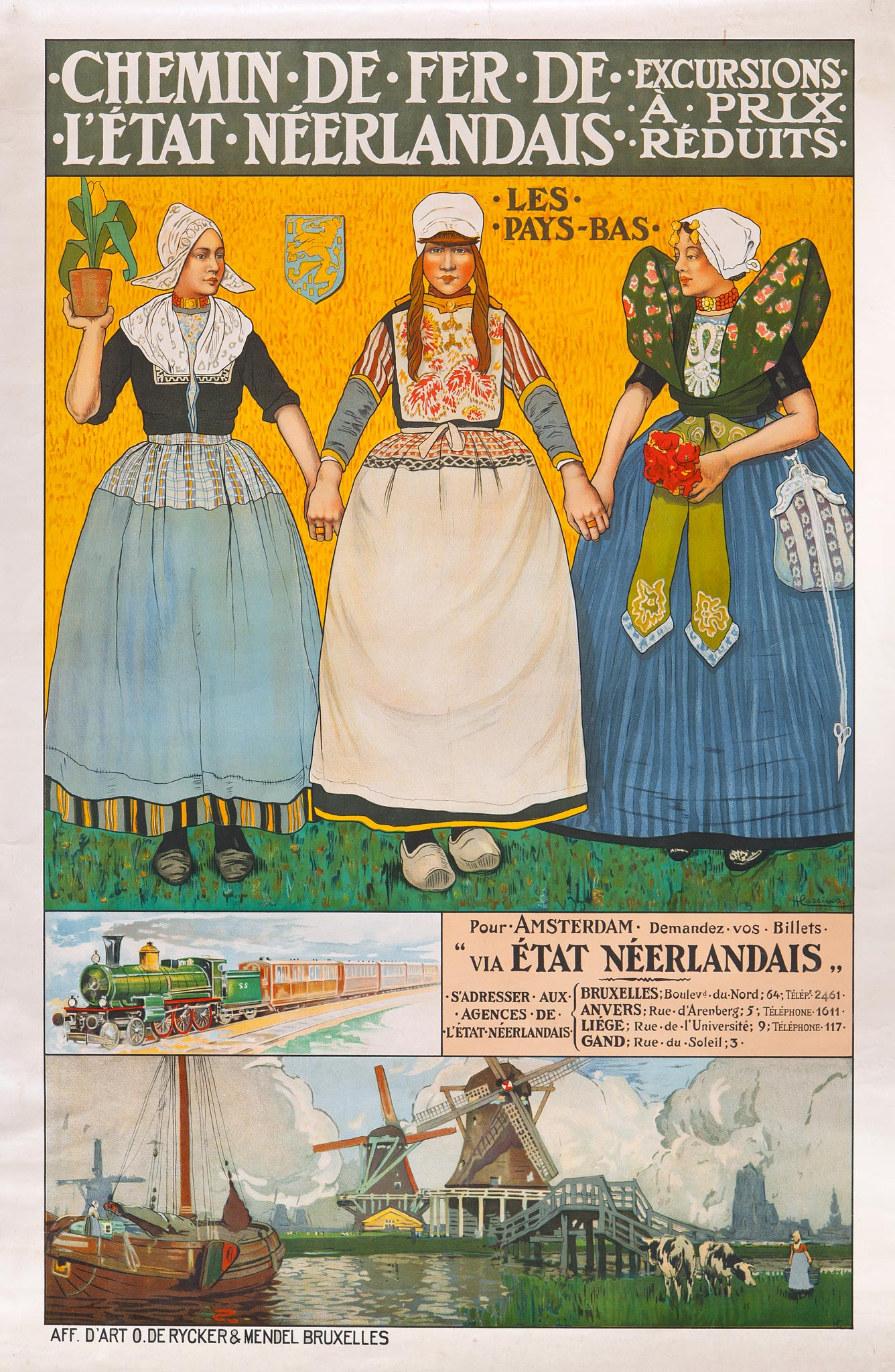 Een affiche voor de Franstalige markt werd ontworpen door Henri Cassiers, een Vlaamse toegepast kunstenaar die ook affiches maakte voor de Red Star Line en andere scheepvaartmaatschappijen. Hij was sowieso al geïntrigeerd door Holland en beeldde ook in zijn andere werk vaak Nederlandse klederdrachten af. Door de drie vrouwen op het affiche — in de dracht van Volendam, Marken en Axel — tegen een goudgele achtergrond te plaatsen leek het resultaat wel wat op een icoon, alsof zij heiligen waren. Een van hen hield een pot met een tulp omhoog. Cassiers beeldde ook nog een trein af met een locomotief van de SS (Staatsspoorwegen) en onderaan een landelijk tafereel in de buurt van Dordrecht.